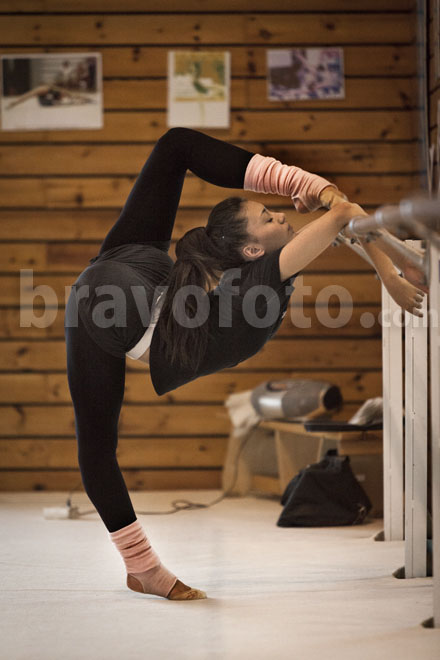 La gimnasta rítmica española Natalia García en el CAR de San Cugat en febrero de 2013.